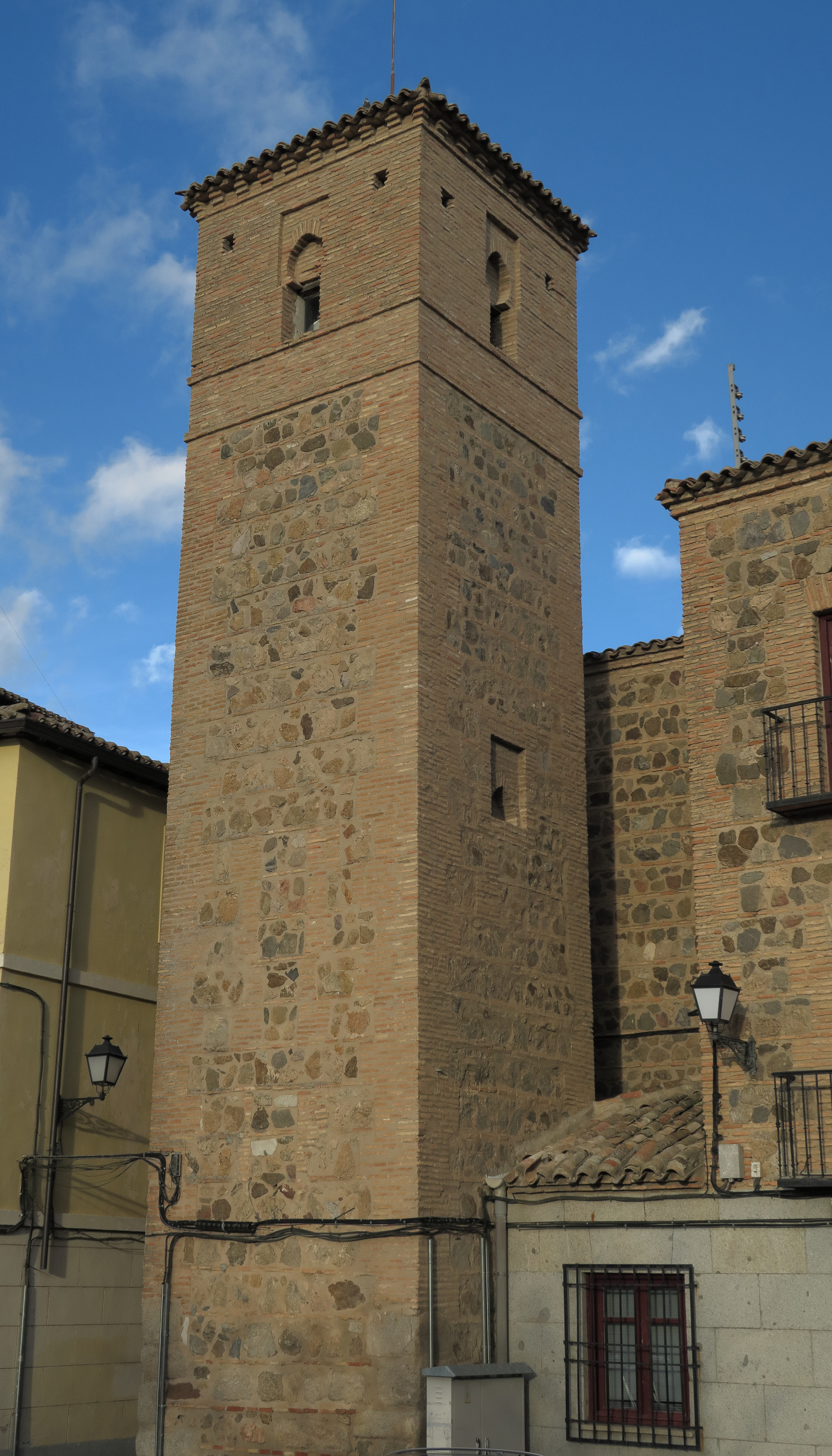 Torre de San Cristobal, Toledo